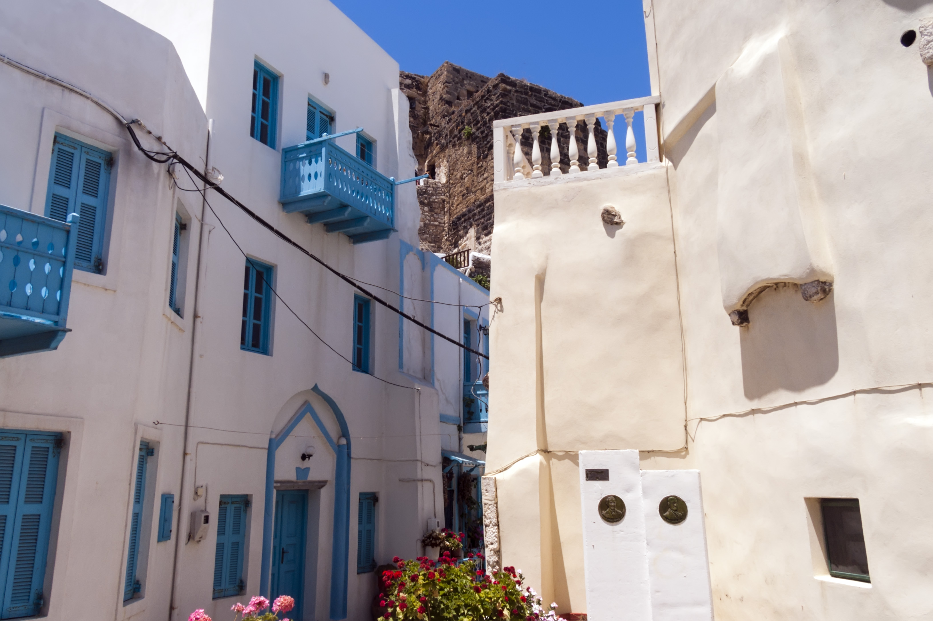 Мандраки. Улица.